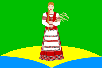 Флаг Анастасиевского сельского поселения, Краснодарский край, Россия